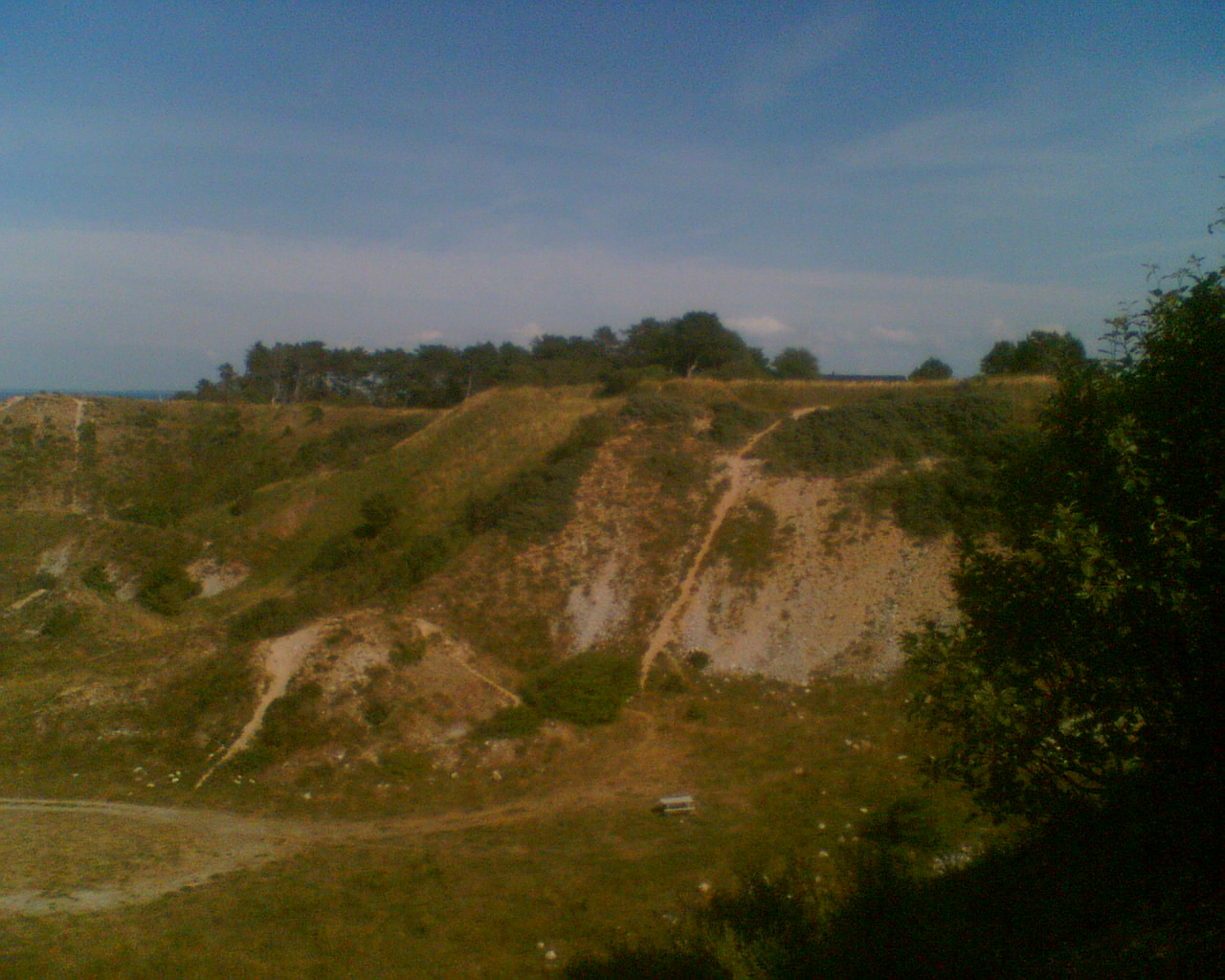 Klint1